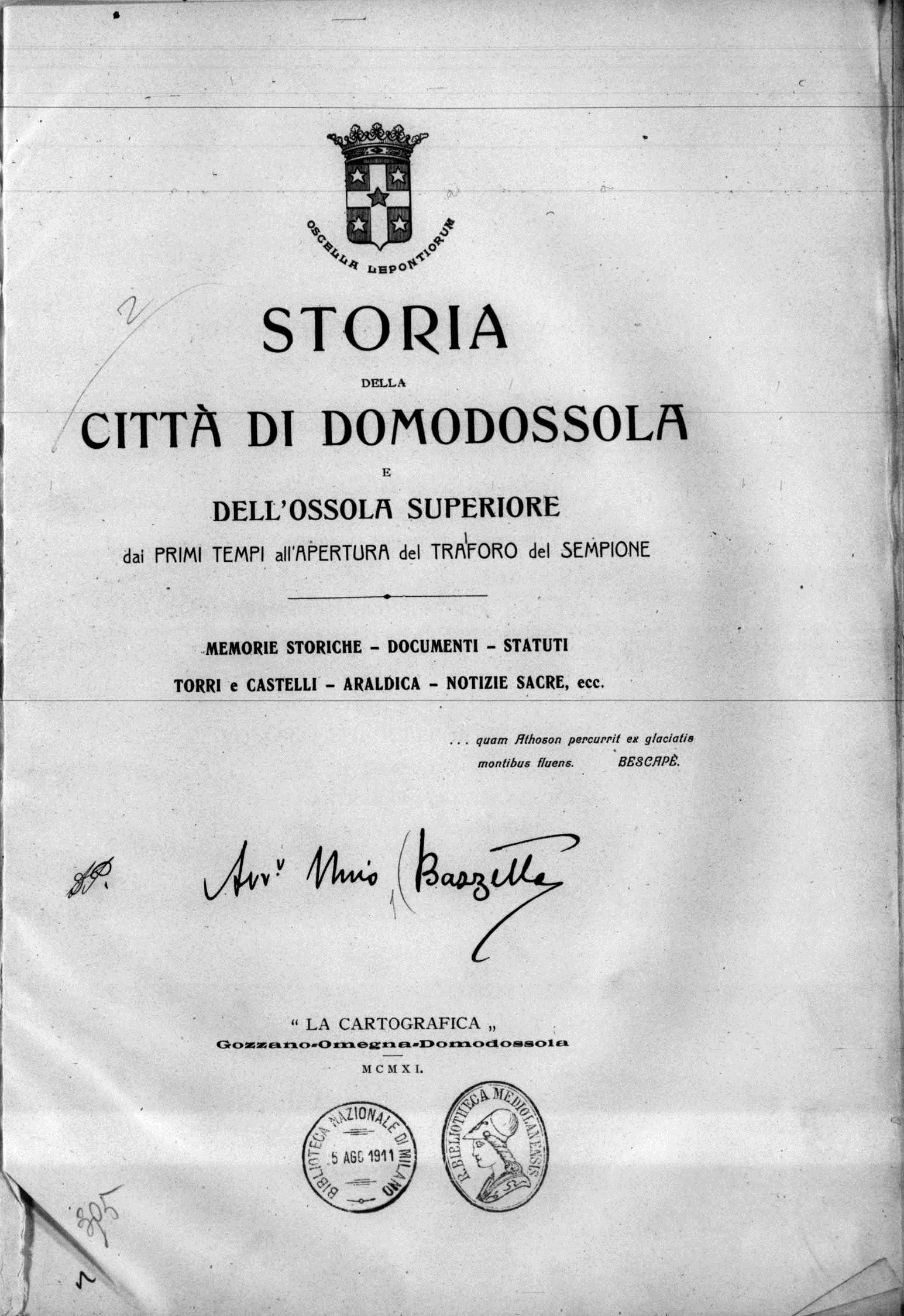 Frontespizio